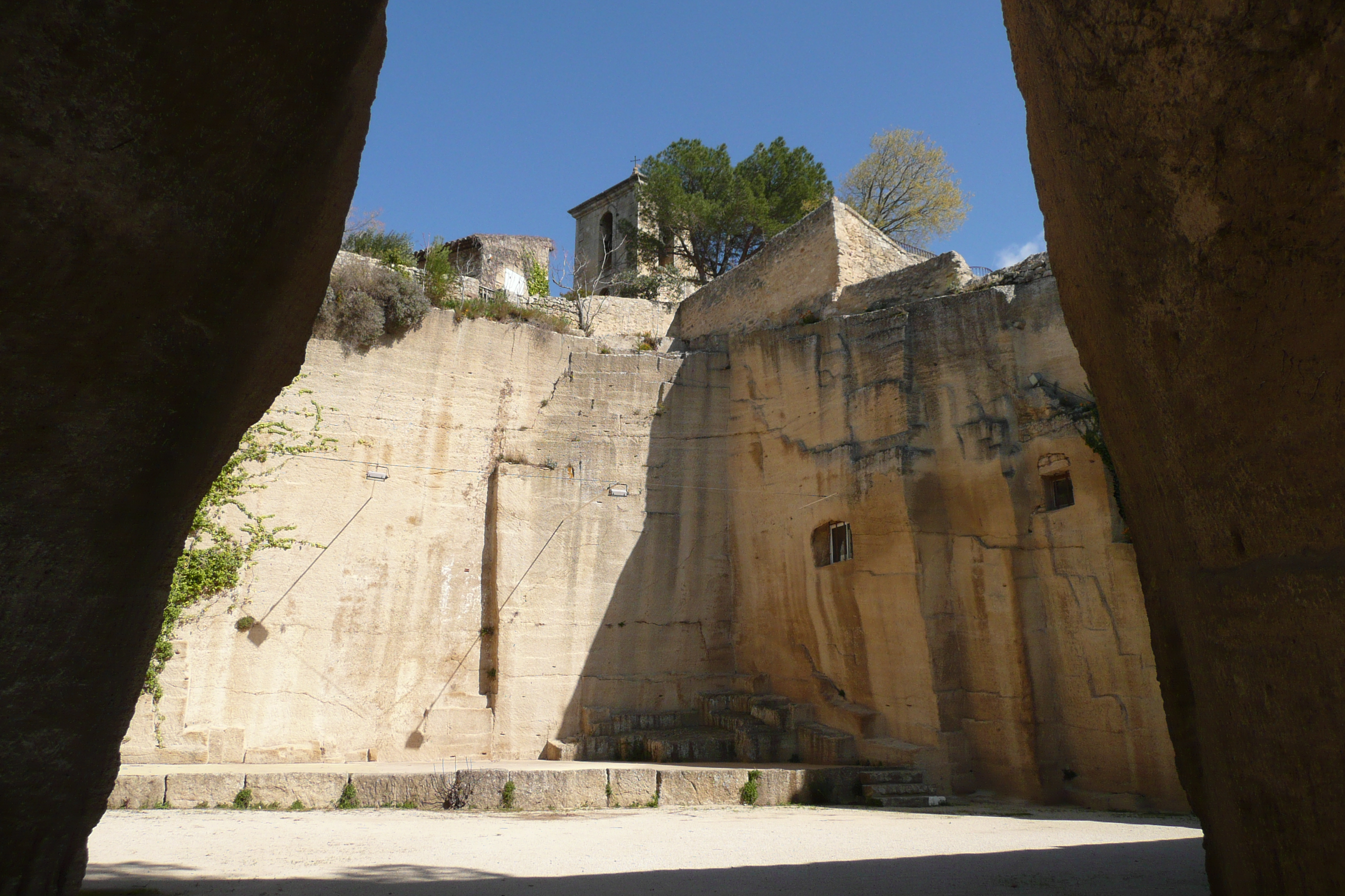 Taillades.